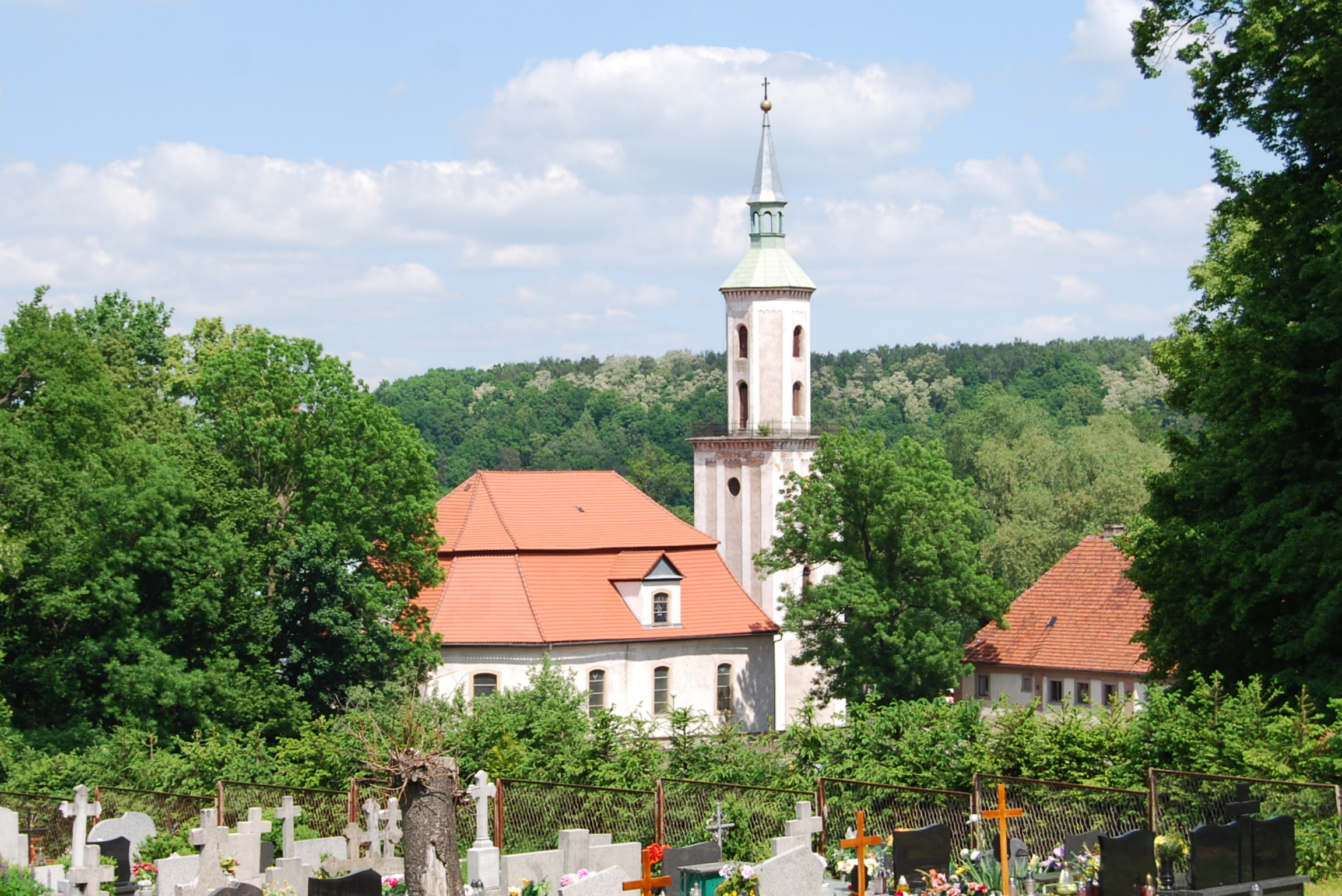 kościół ewangelicki, ob. rzym.-kat. p.w. M.B. Różańcowej, 1749, 1853